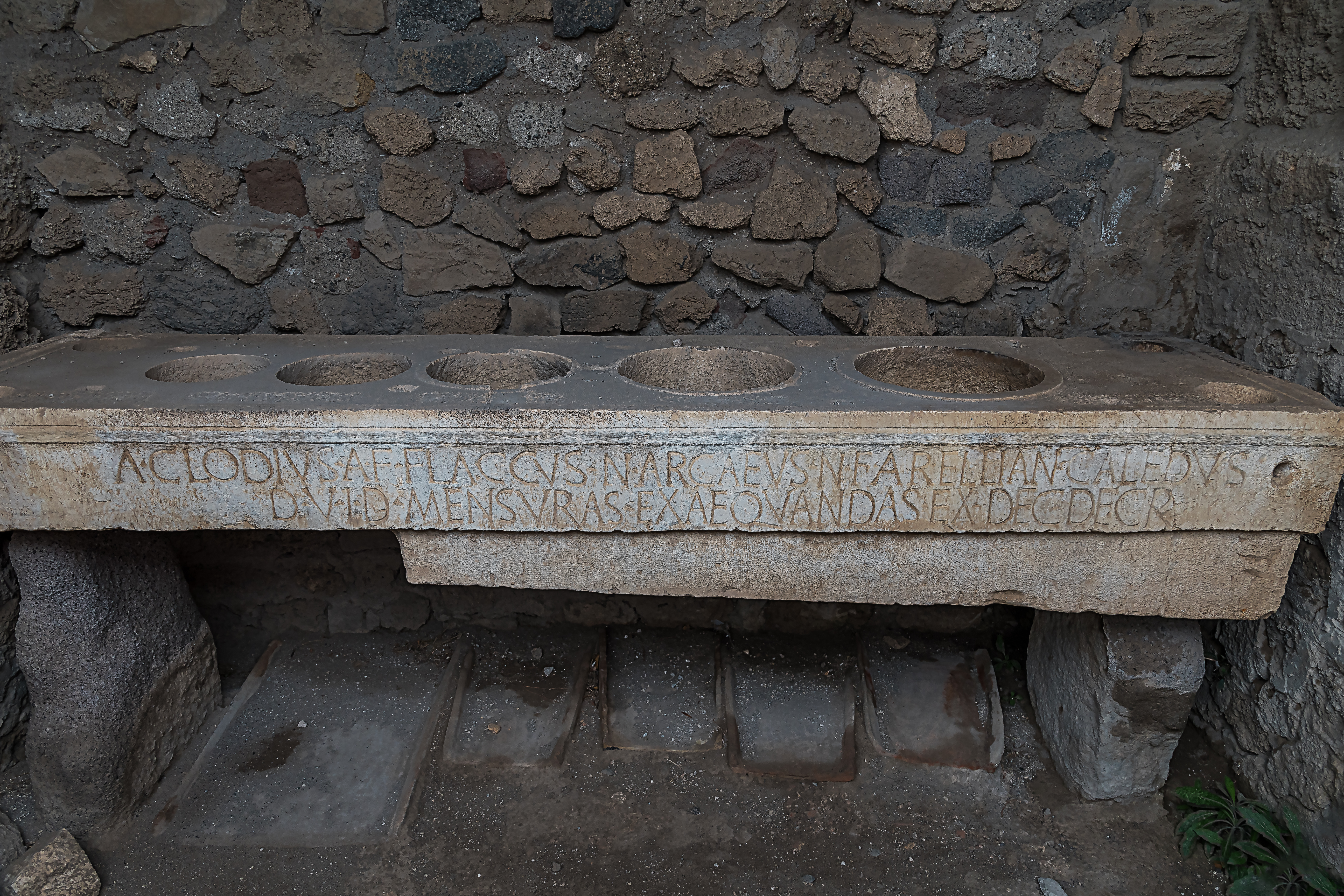 Eichtisch (mensa ponderaria) mit eingelassenen Messeinheiten für Hohlmaße. Die Kalksteinplatte aus dem 1. Jahrhundert v. Chr. (20 - 10 v. Chr.) befindet sich in Pompeji auf dem Forum, am Apollontempel (CIL 10, 793)